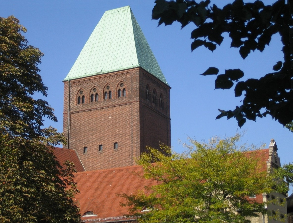 Berlin-Mitte. Märkisches Museum, Teilansicht mit dem Turm des Museums. Eigenes Foto, 2005. Fotograf: Manfred Brückels.